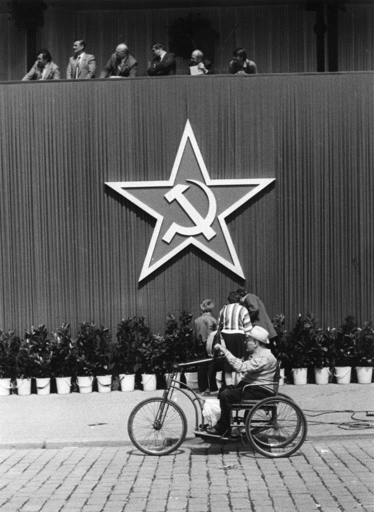 František Dostál Humor